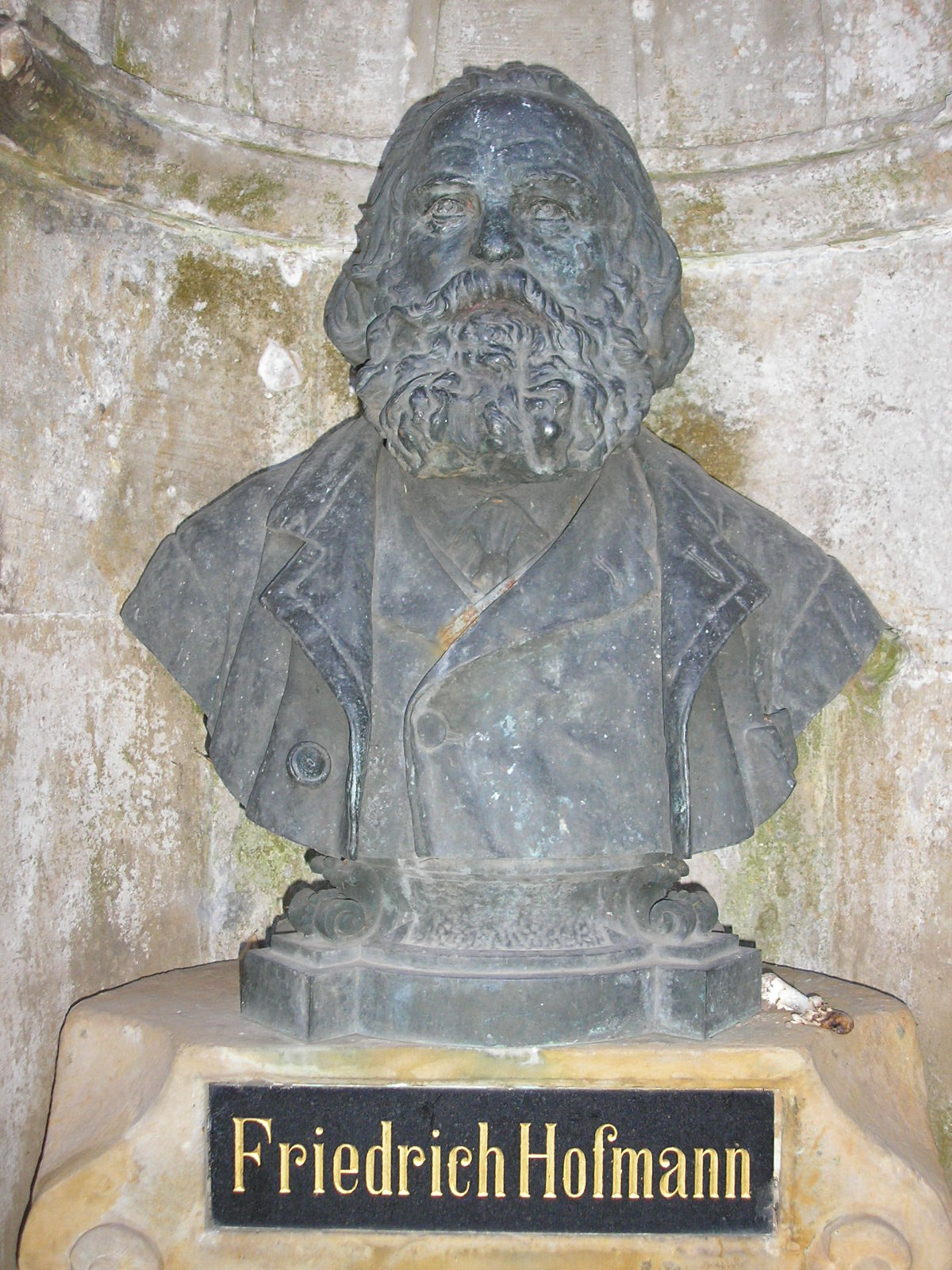 Büste Friedrich Hofmanns im Denkmal in Ilmenau (Thüringen).